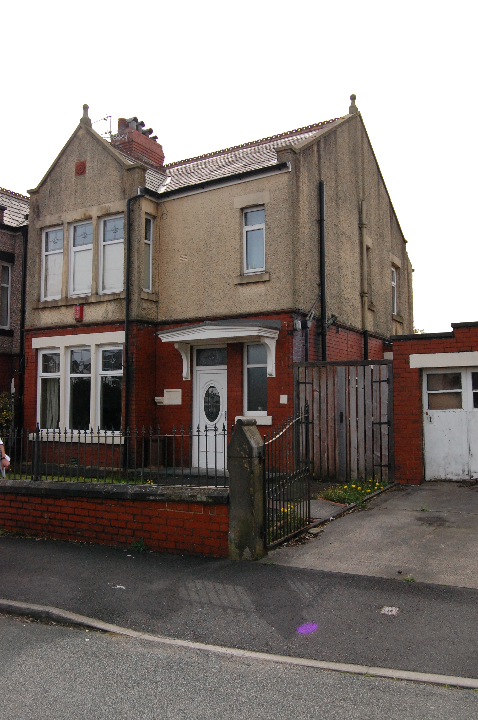 Haus Nr. 73, Higher Croft Road in Lower Darwen